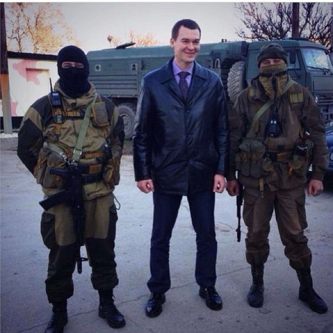 Михаил Дегтярёв на аэродроме морской авиации, март 2014